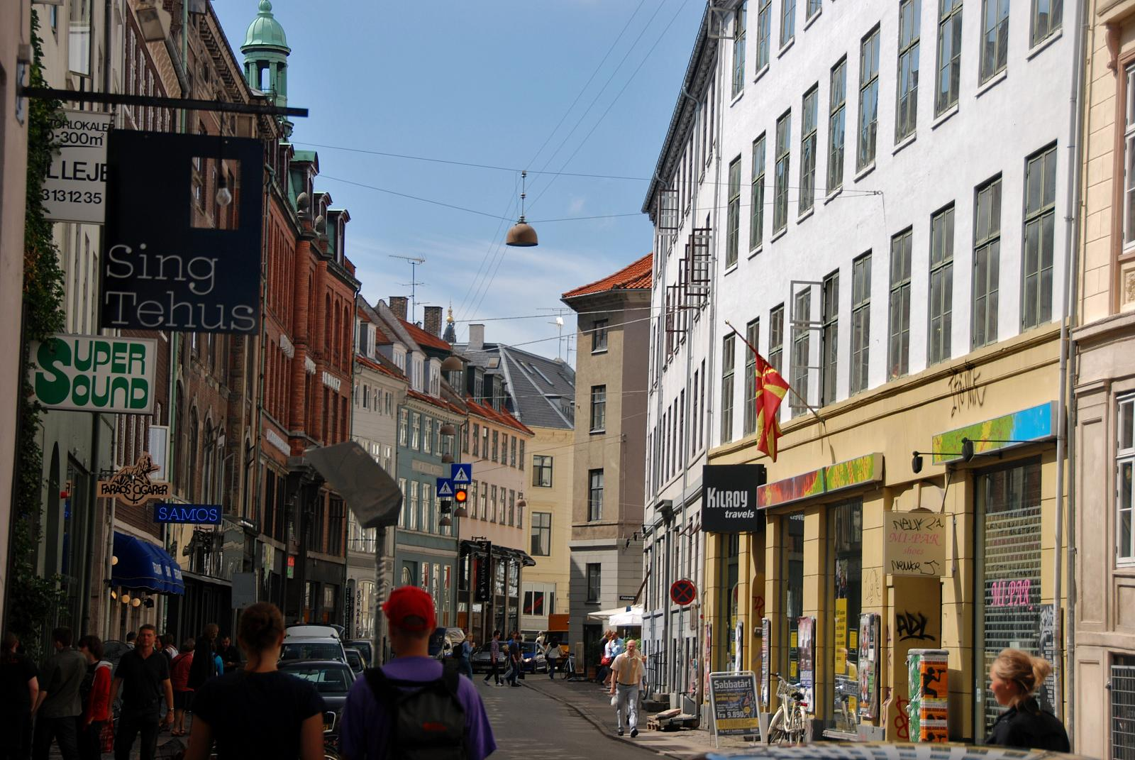 Skindergade in Copenhagen, Denmark